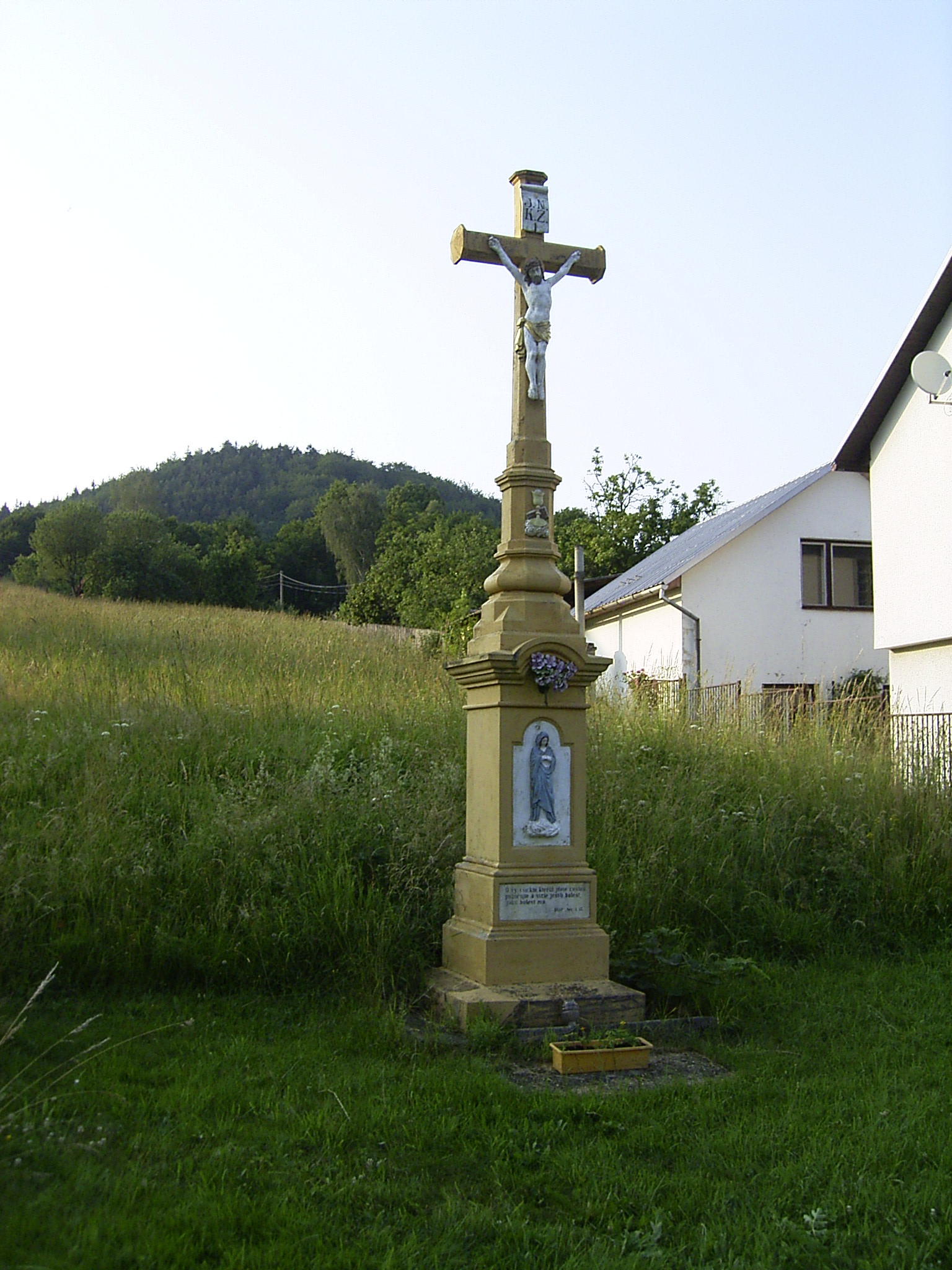 Oznice (okres Vsetín) - kamenný kříž